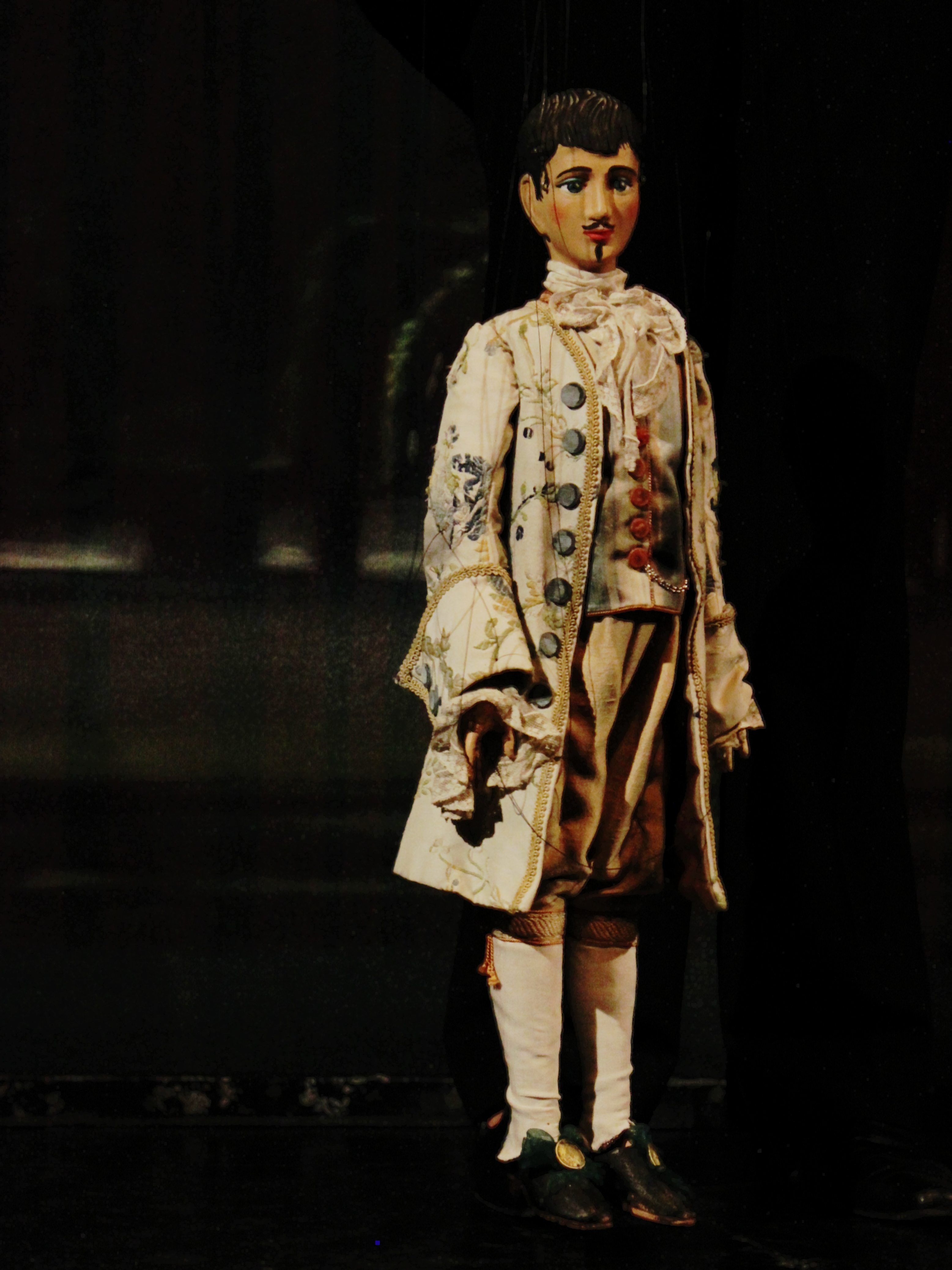 Tag des Denkmals - Führung im Schönbrunner Marionettentheater